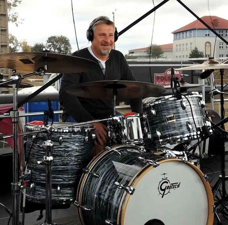 Krzysztof Poliński przy swoim zestawie perkusyjnym podczas koncertu plenerowego w 2015 roku.